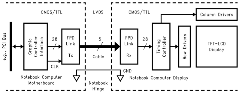 Типове пiдключення 24-бiтного дiсплею до лептопа через FPD-Link LVDS з'єднання. Малюнок було зроблено використовуючи публiчну документацiю Texas Instruments